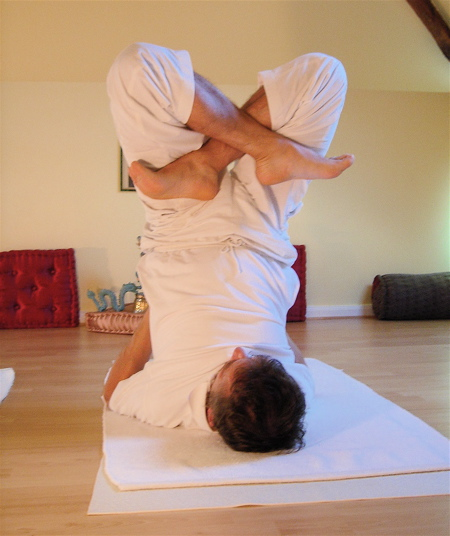 Yoga postures padma-sarvangasana